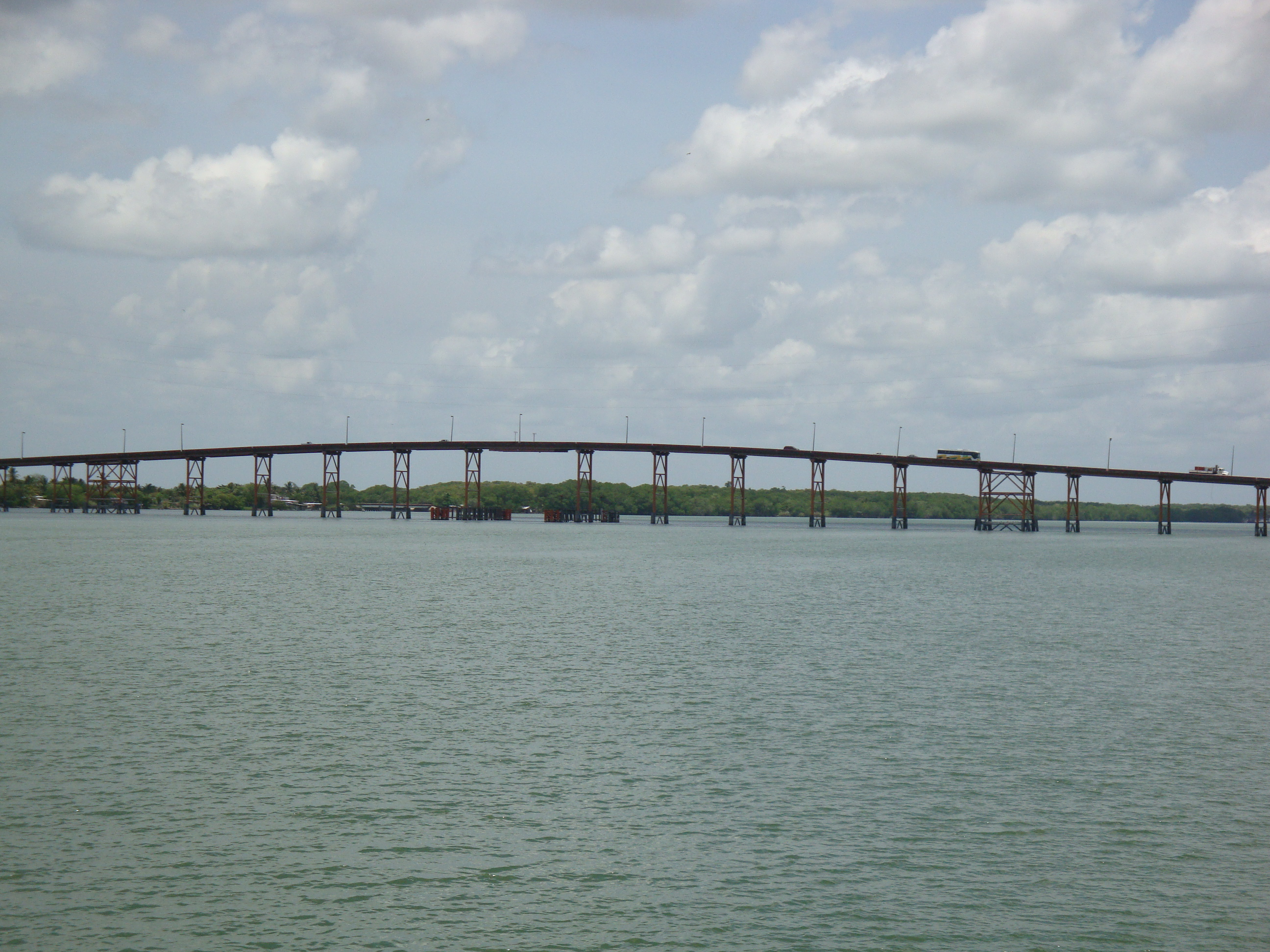 "Puente Frontera", en el municipio de Centla, estado mexicano de Tabasco. Inaugurado el 2 de febrero de 1986 por el gobernador Enrique González Pedrero.